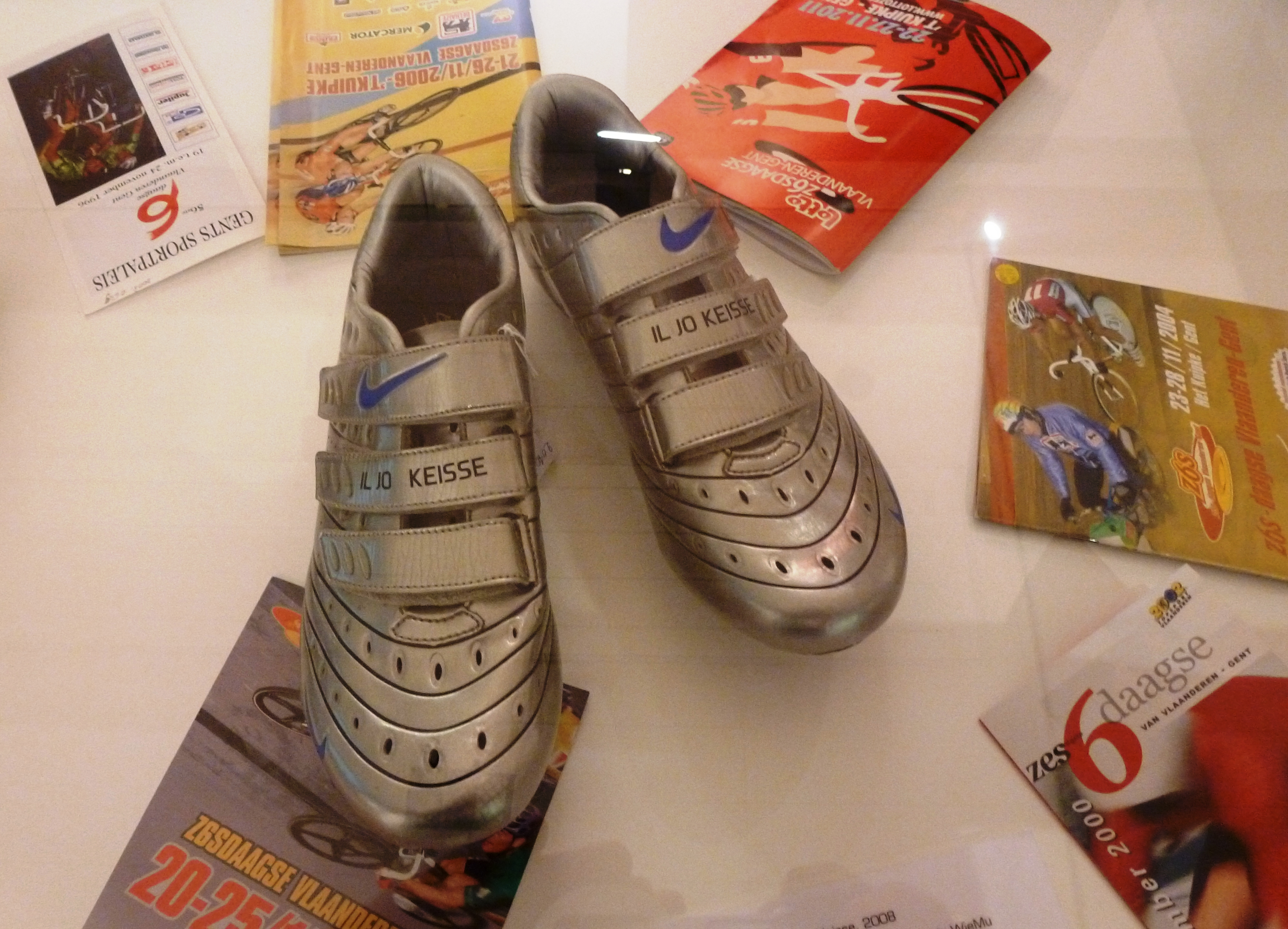 Rennschuhe von Iljo Keisse, im National Wielermuseum in Roeselaere, Belgien